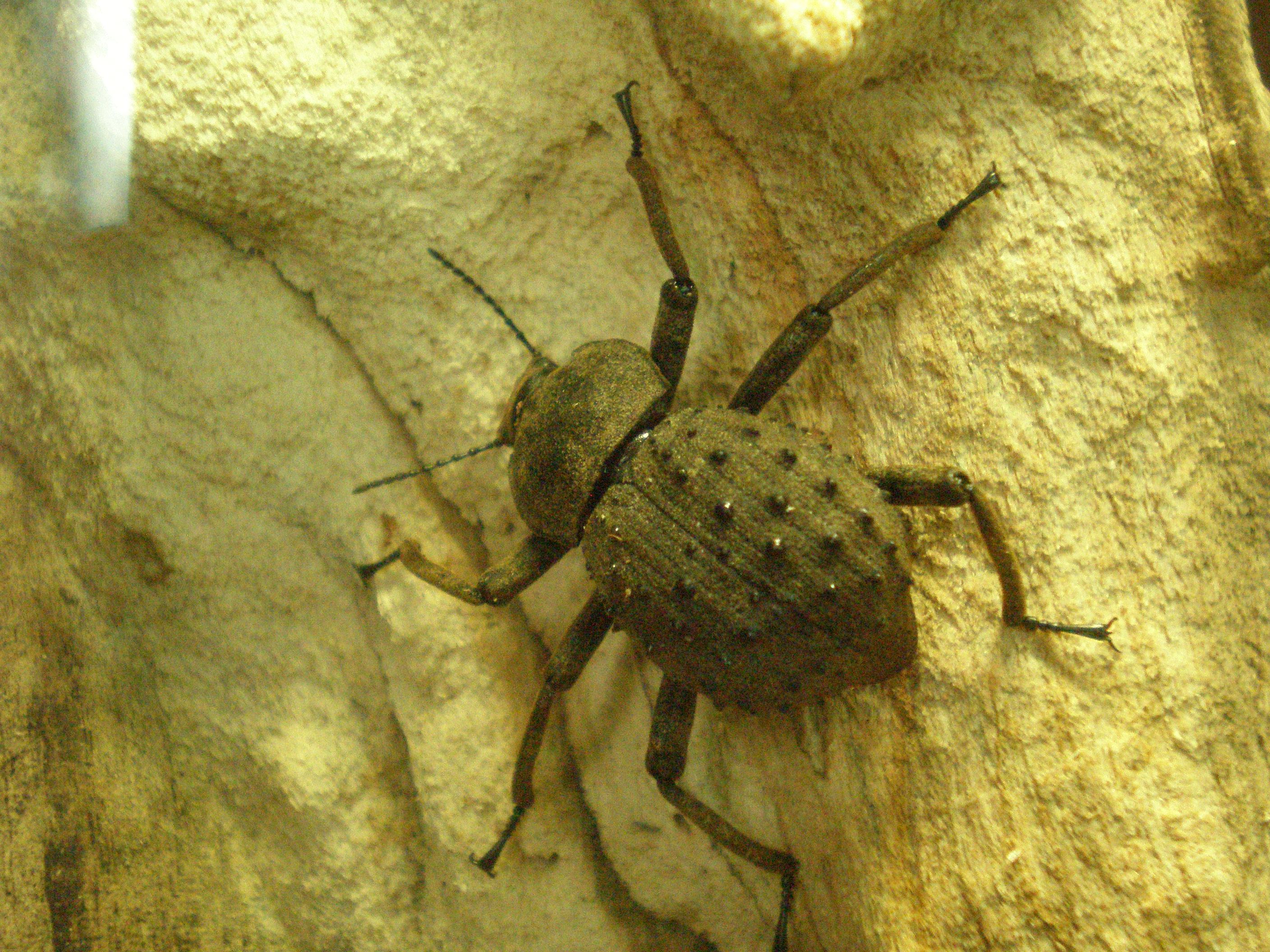 De fregateilandkever (Polposipus herculeanus)